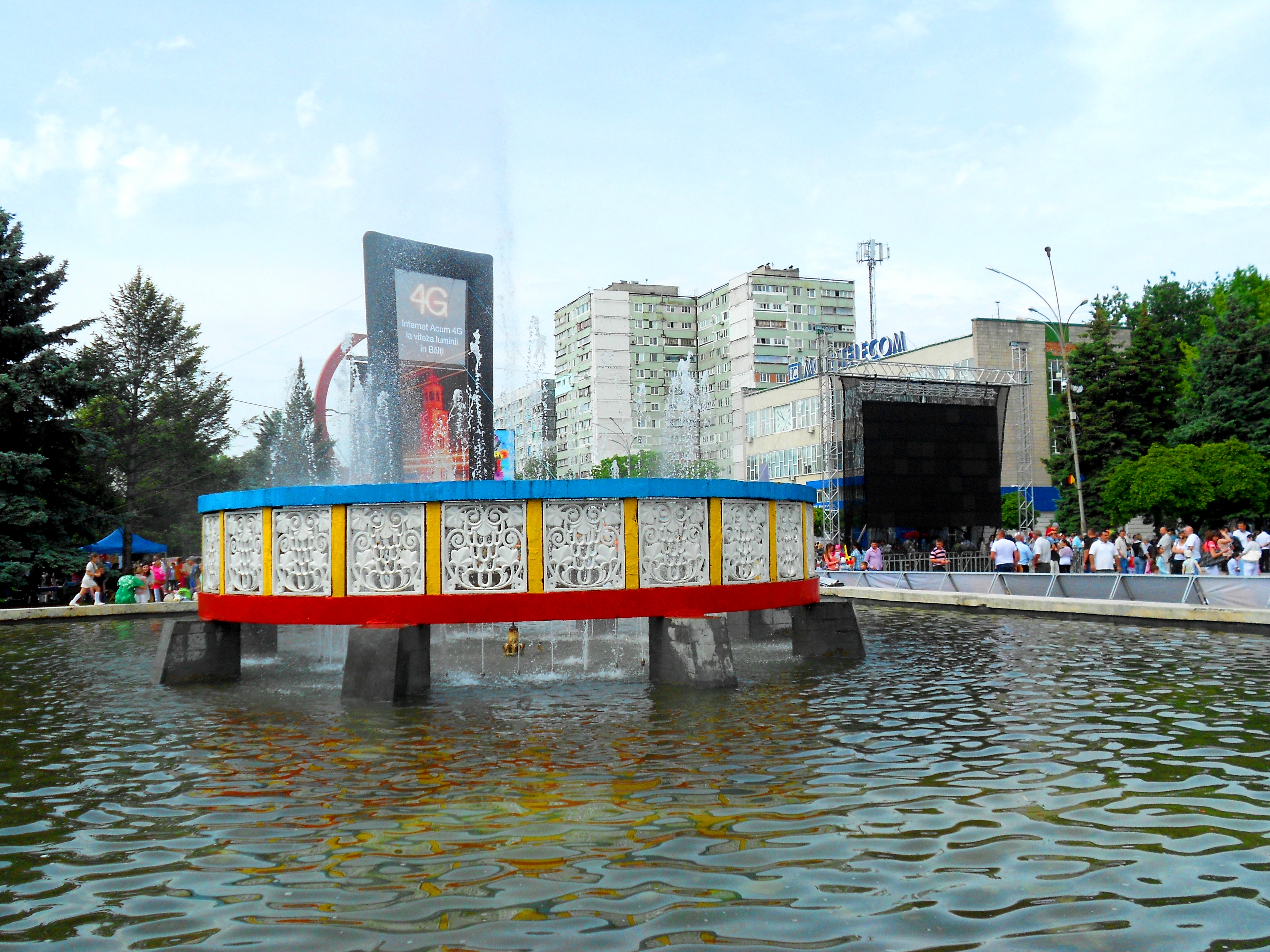 Havuz în Piața Alecsandri din Bălți